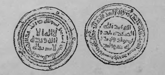 Арабські гроші на Українї; діргем (срібняк) 708 року.